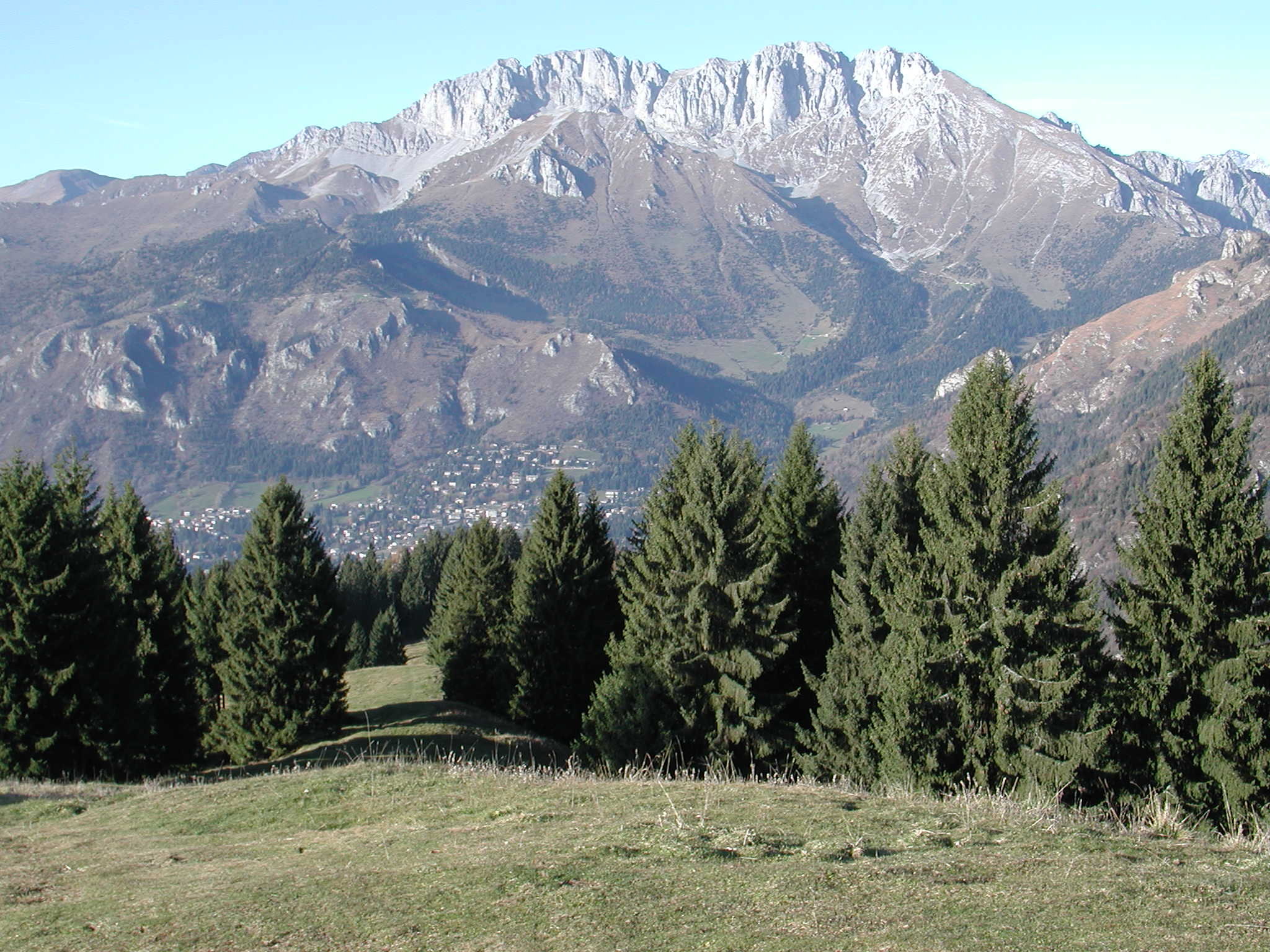 Alpi Orobie, Val Seriana, Italy Presolana e Castione